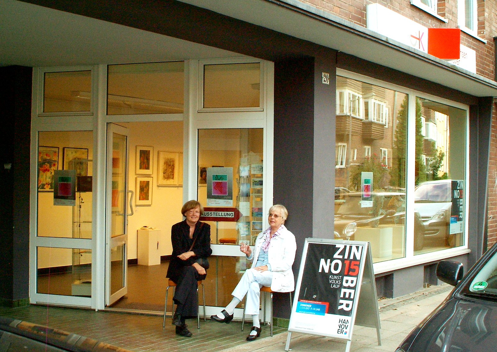 Die Künstlerinnen Karin Hess und Erika Klee, hier in der Sohnreystraße 20, in Hannover Südstadt, am Eingang zum Galeriebüro des GEDOK NiedersachsenHannover e.V. während des Zinnober-Kunstvolkslaufs 2012 ...